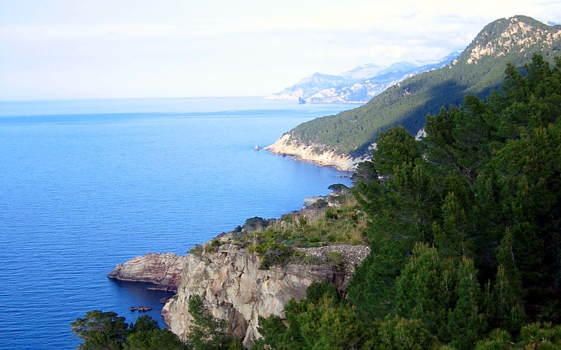 Mallorca - Spain